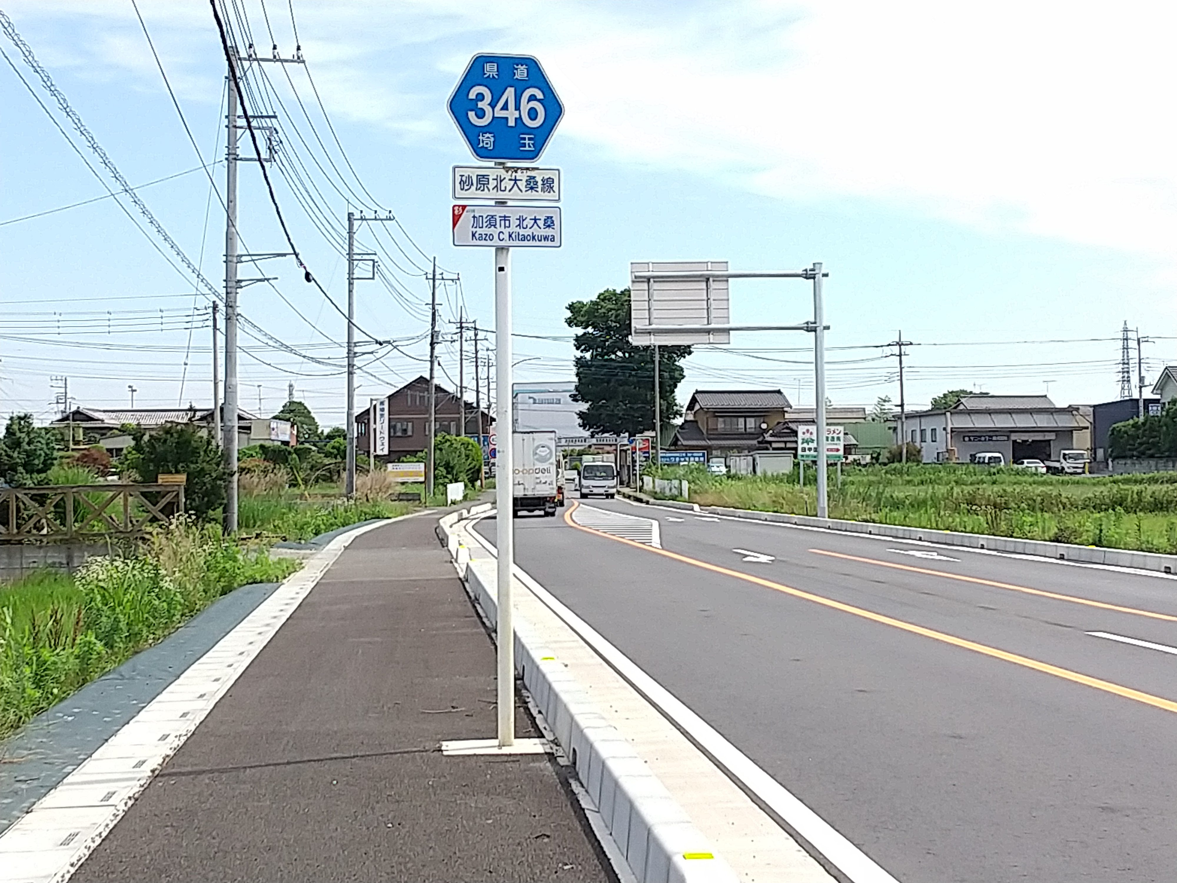 2020年6月撮影 北大桑付近にて